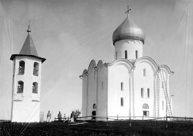 Kristi förklarings kyrka i Nereditsa (Spas-Nereditsy).